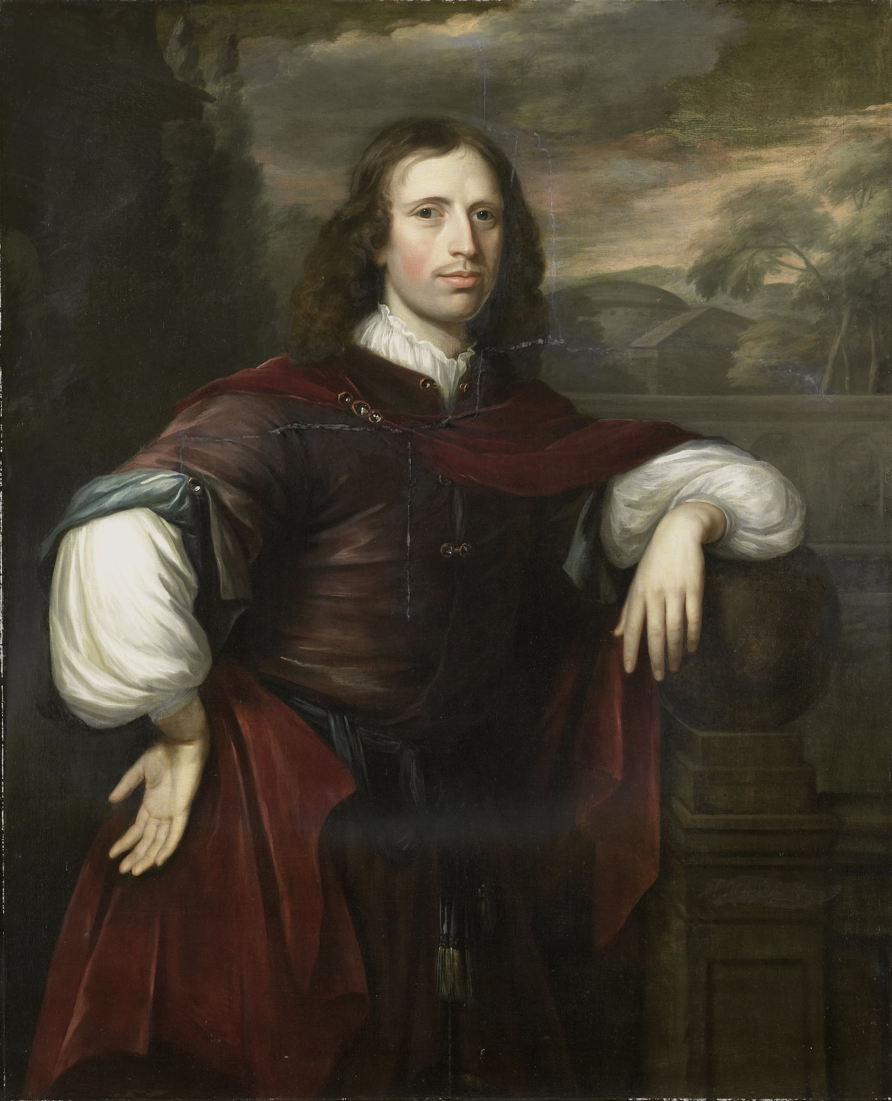 Portret van een man. Kniestuk, staande met de linkerarm geleund op een balustrade, de rechterhand in de zij. Op de achtergrond een landschap. Pendant van SK-C-25.